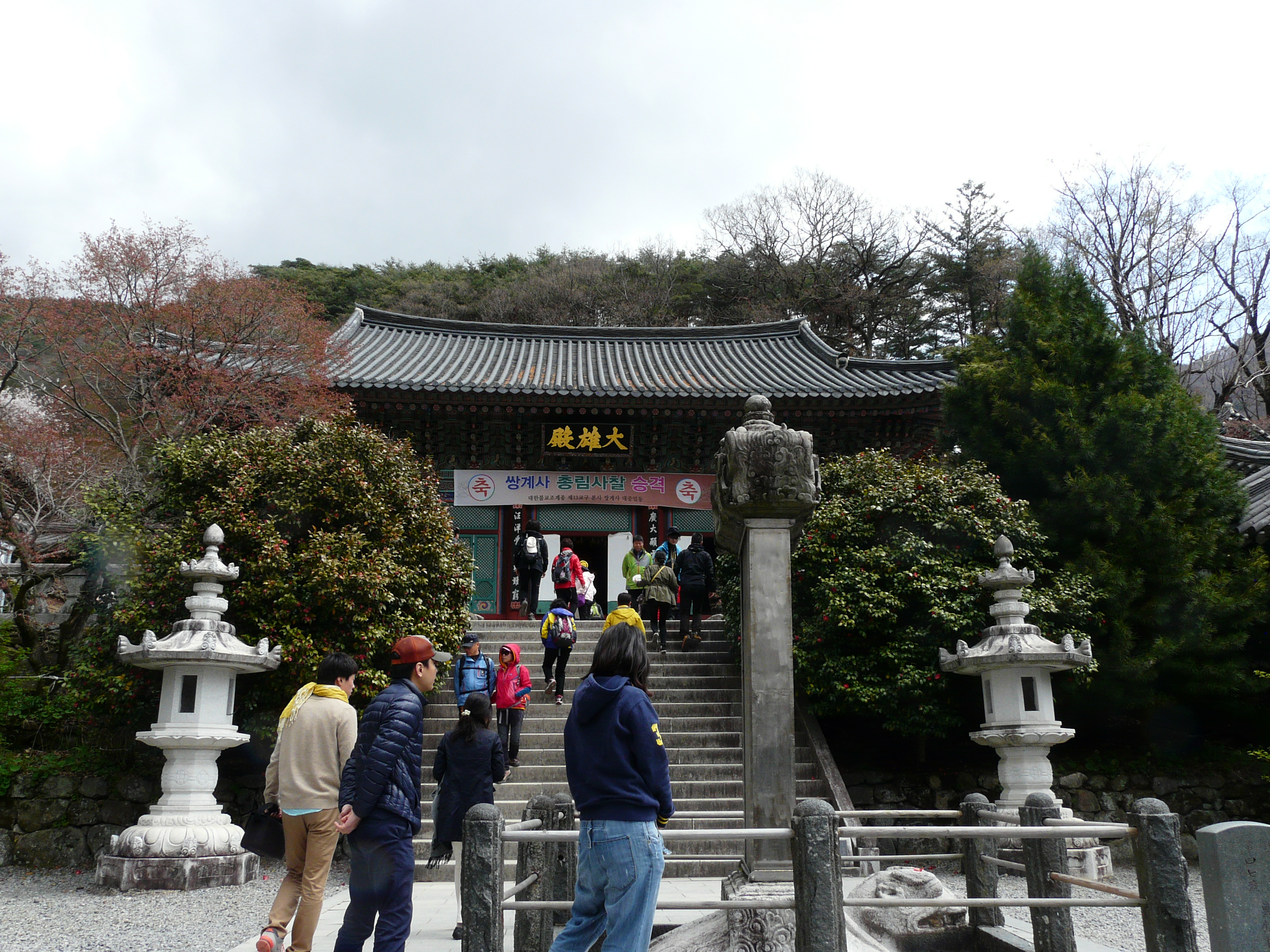 Ssanggyesa temple (쌍계사)